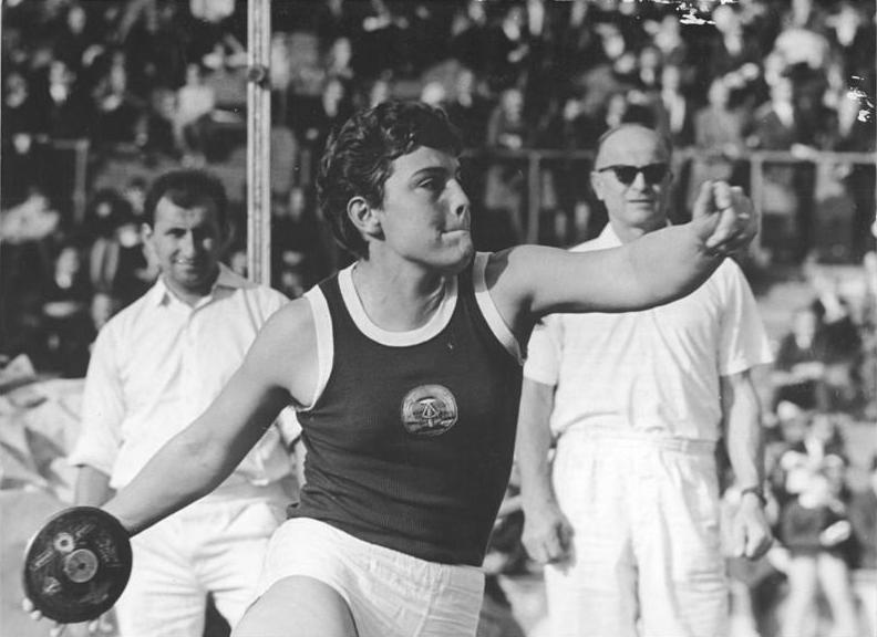 Anita Hentschel Zentralbild Studré 20.06.1967 Volkswahlen 1967 Halle: Anita Hentschel:"Unser Dank sei unsere Tat"."Es ist gut so, daß in unserer Republik jeder Mensch - gleich wo er steht, welchen Arbeitsplatz er einnimmt - mittun kann am gemeinsamen Werk. Der Beitrag des einen mag bescheiden erscheinen, der den anderen bedeutender, aber alle eint der Wunsch, nicht abseite zu stehen." Das sagte die Europameisterschafts-Dritte von Budapest im Diskuswerfen, Anita Hentschel (SC Chemie Halle-Archivfoto) , zu den bevorstehenden Volkswahlen. Die 24jährige zukünftige Unterstufenlehrerin hält den DDR-Rekord mit 59,02 m. (Siehe ADN-Meldung Nr. 600 v. 21.06.1967)